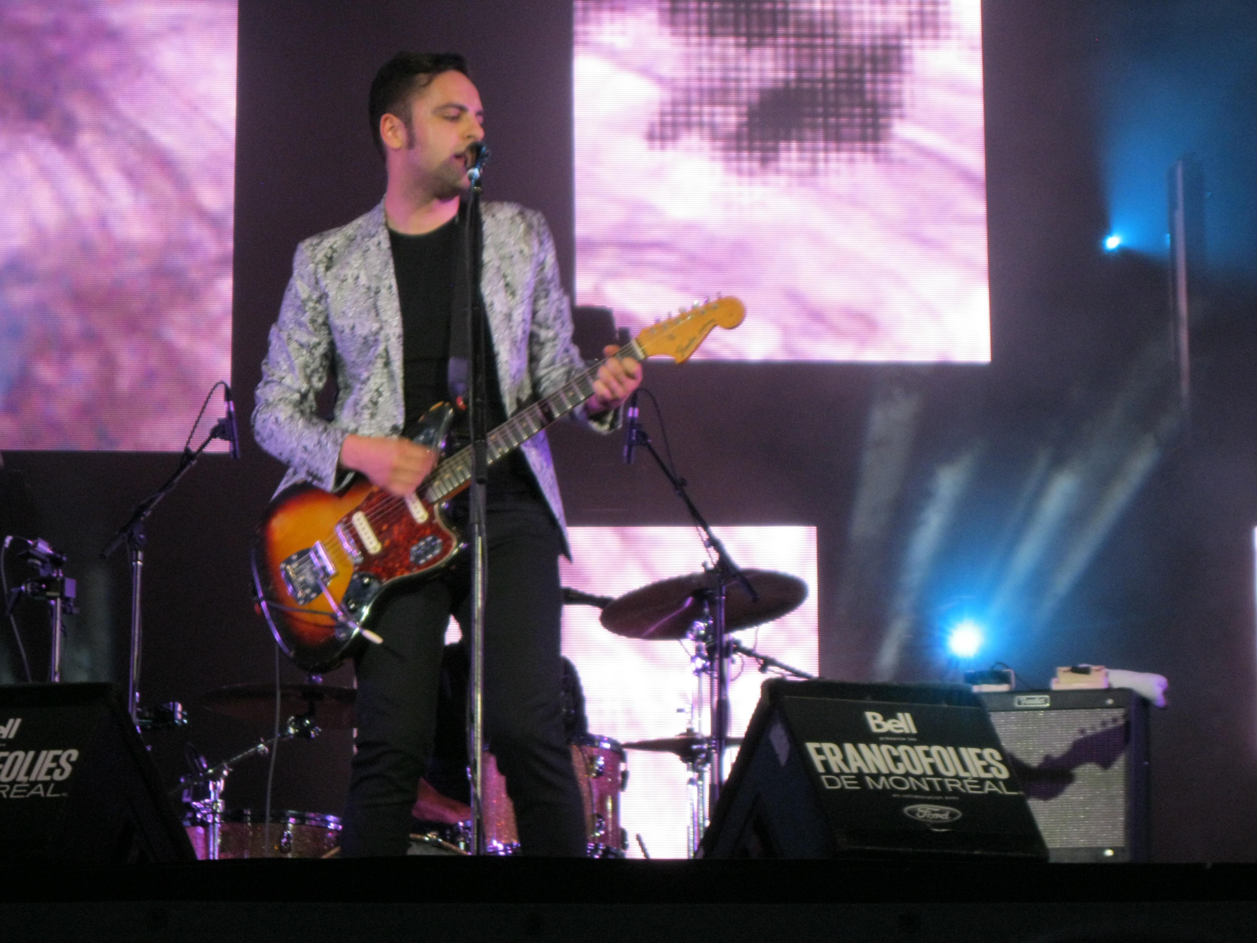 Dumas a offert une performance aux FrancoFolies de Montréal, le 14 juin 2013, à la place des Festivals.